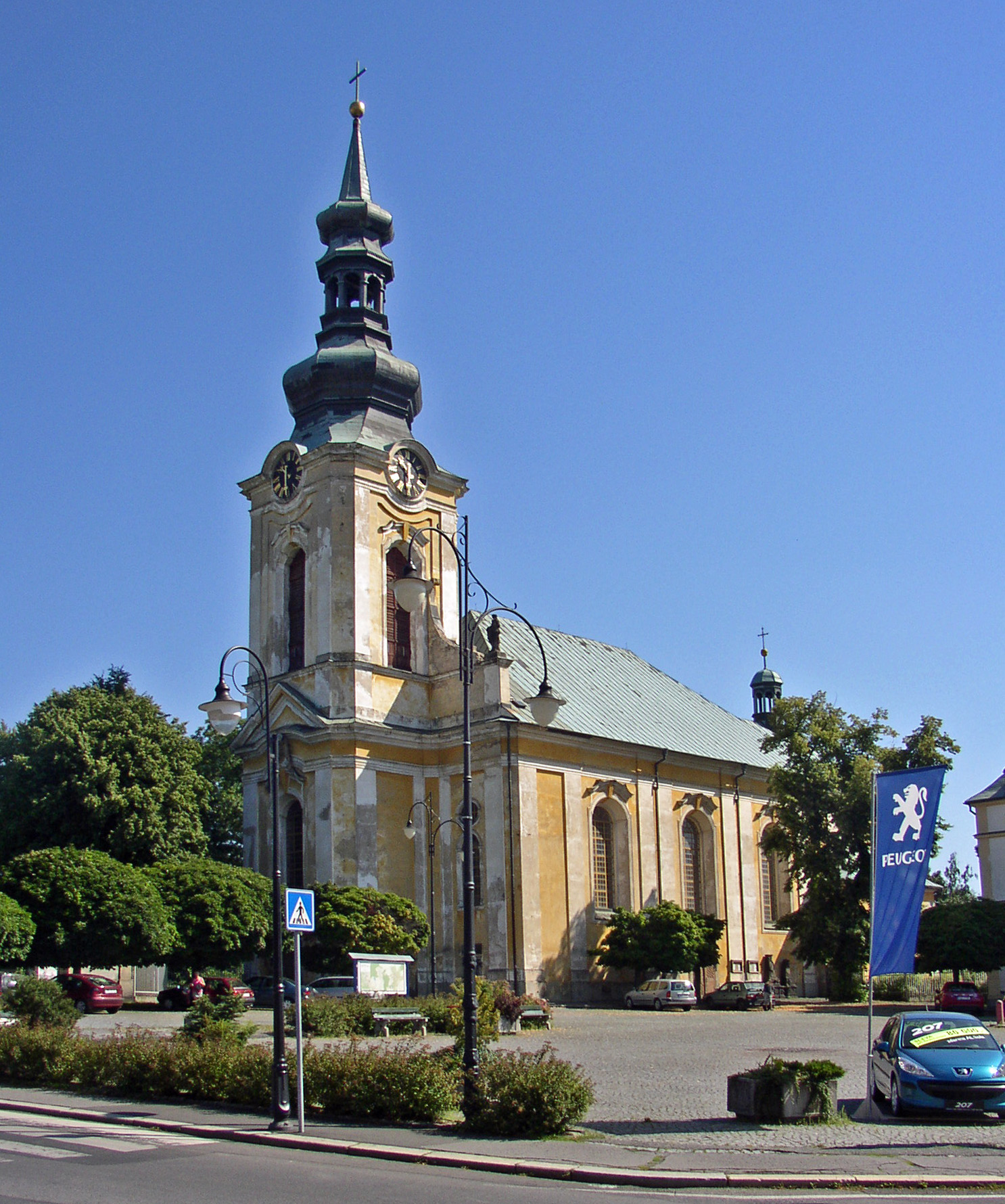 Děkanský kostel sv. Petra a Pavla na Benešově náměstí ve Varnsdorfu